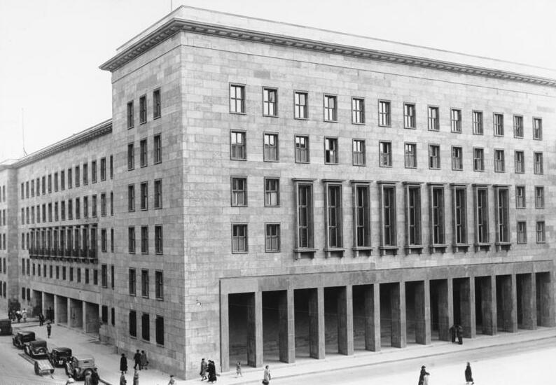 Berlin Das Reichsluftfahrtministerium